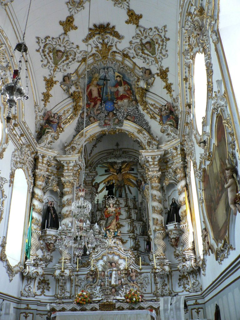 Main chapel of St Francisco Church in São João del-Rei, Brazil